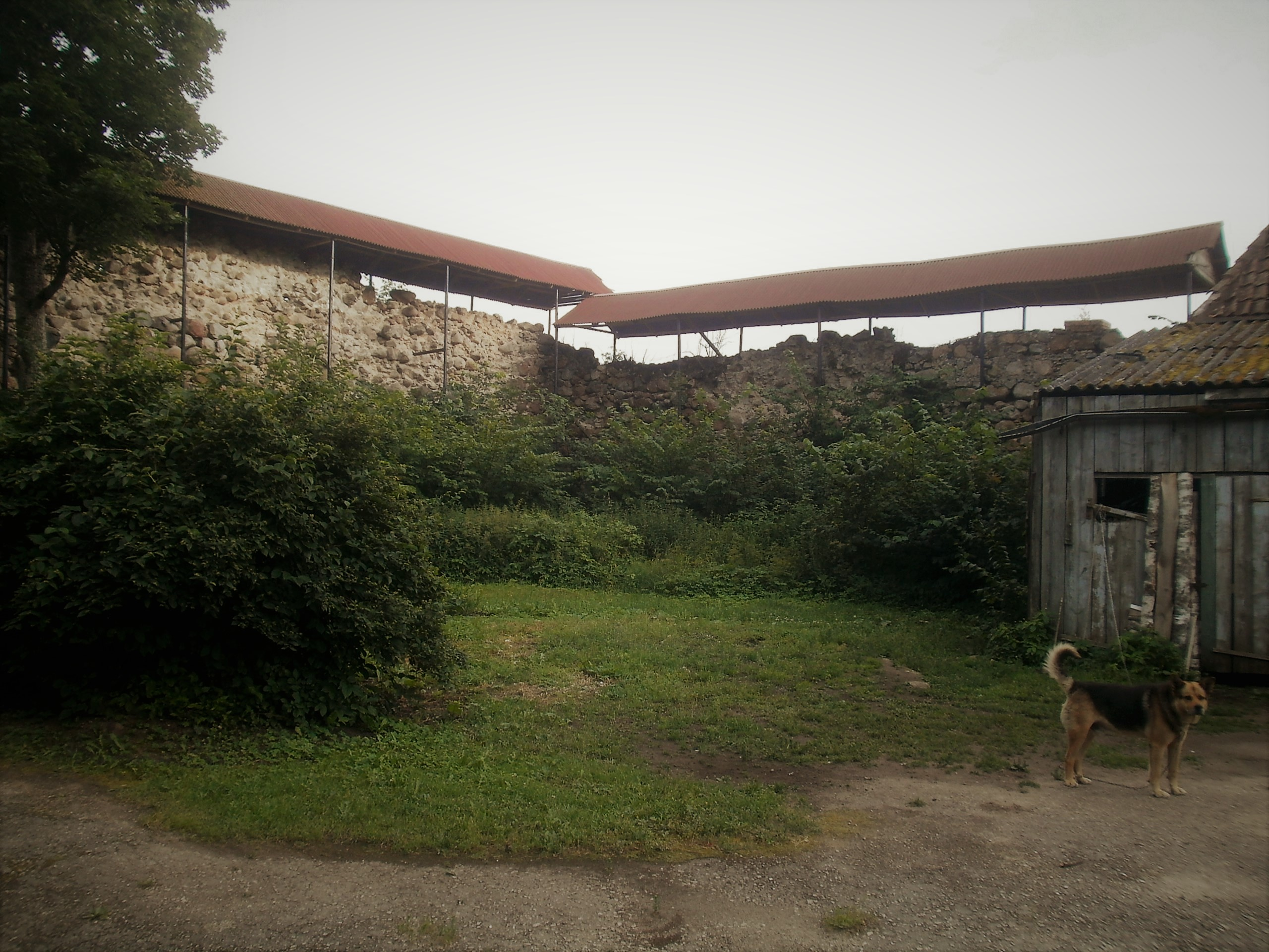 Vaade linnusehoovist kastelli lõunanurgale.